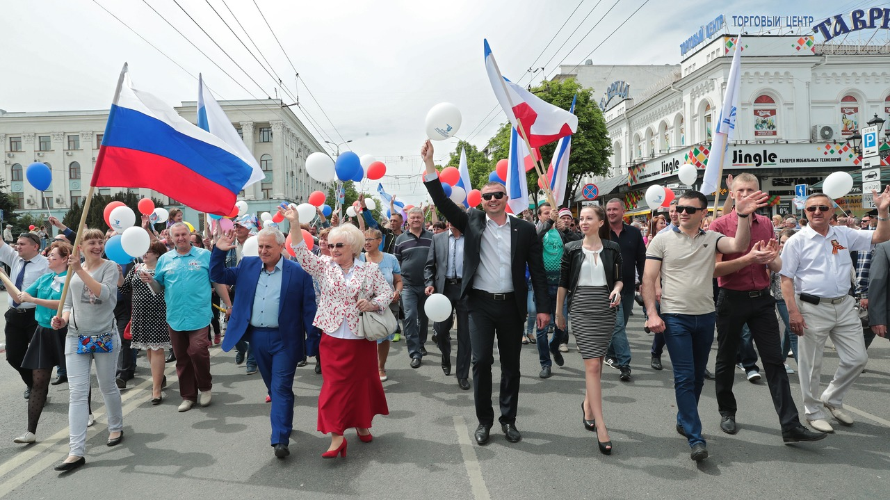 Глава Республики Крым Сергей Аксёнов и Председатель Государственного Совета Республики Крым Владимир Константинов проследовали в составе праздничного шествия, посвящённого Празднику Весны и Труда, по центральной улице Симферополя.